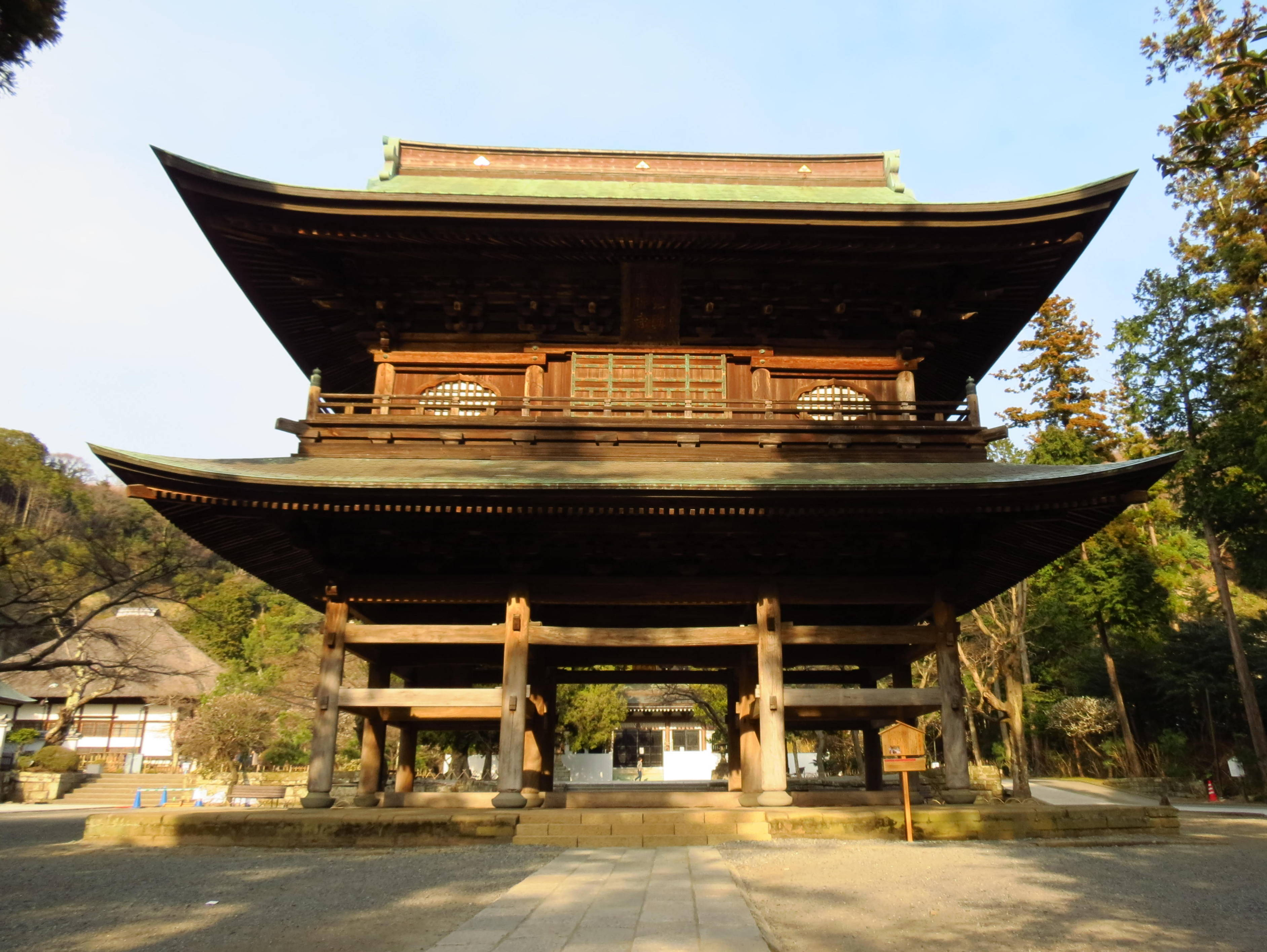 Engaku-ji